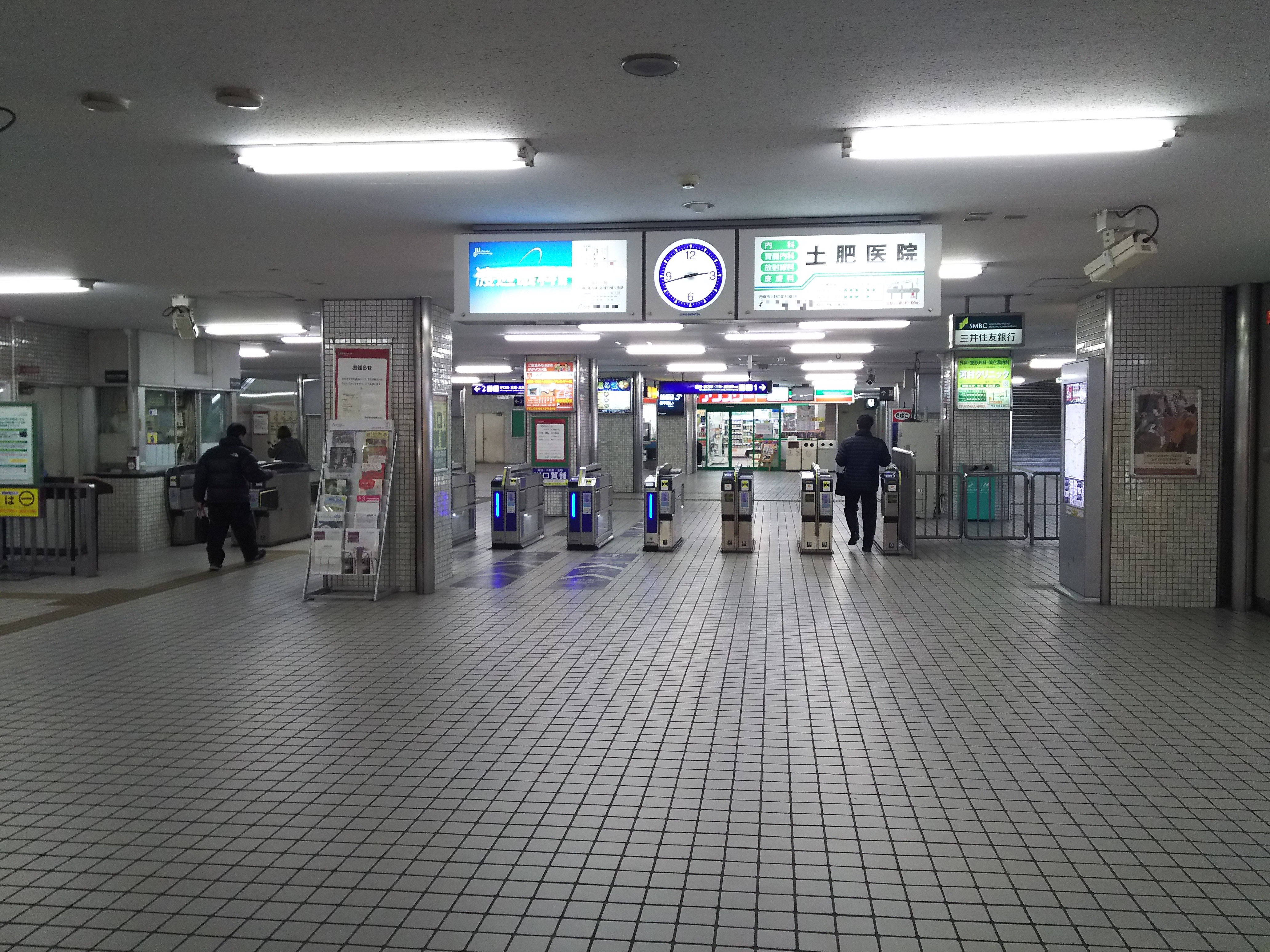 京阪本線大和田駅改札口（大阪府門真市）